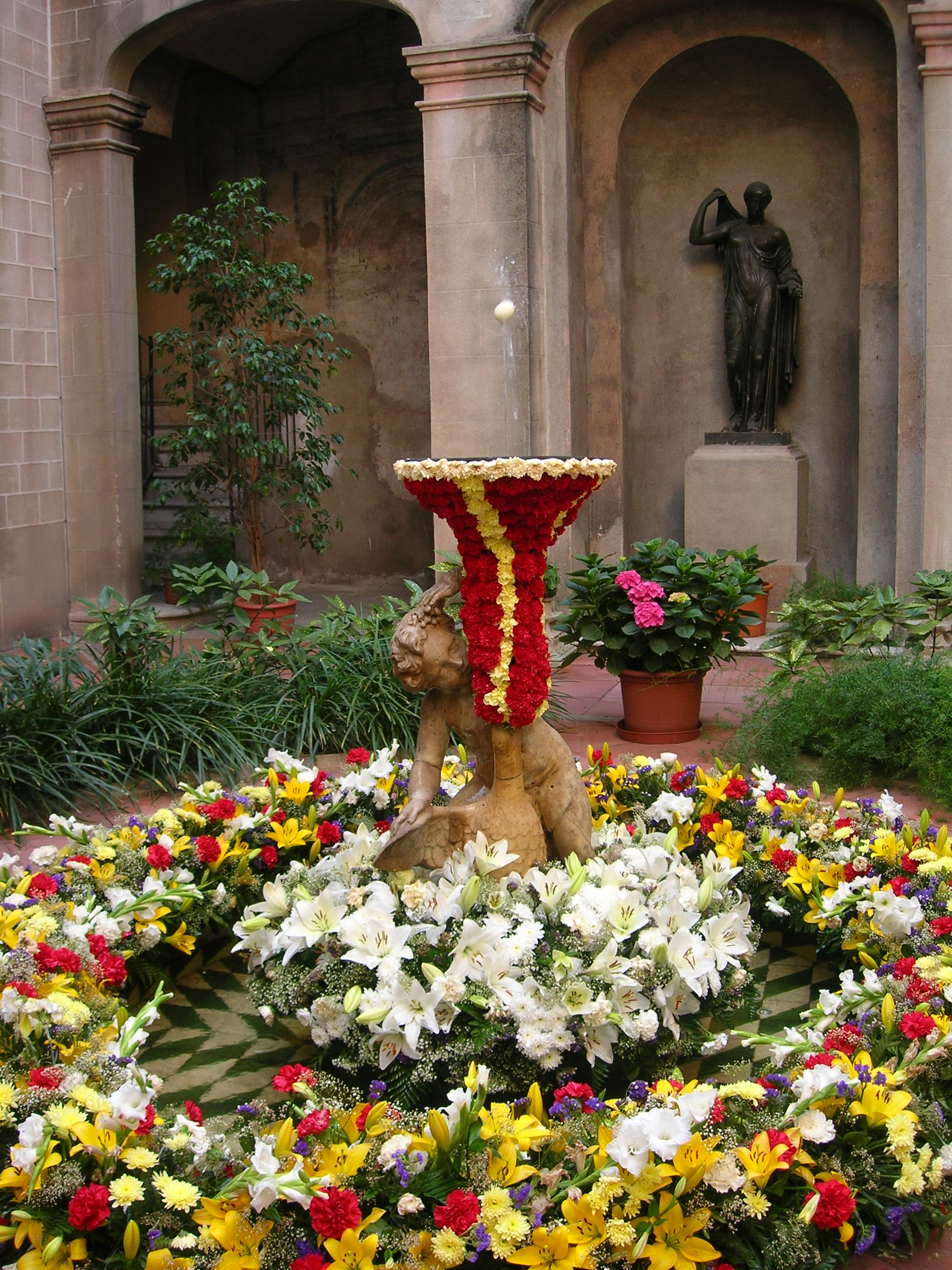 Palau Requesens (Barcelona), l'ou com balla